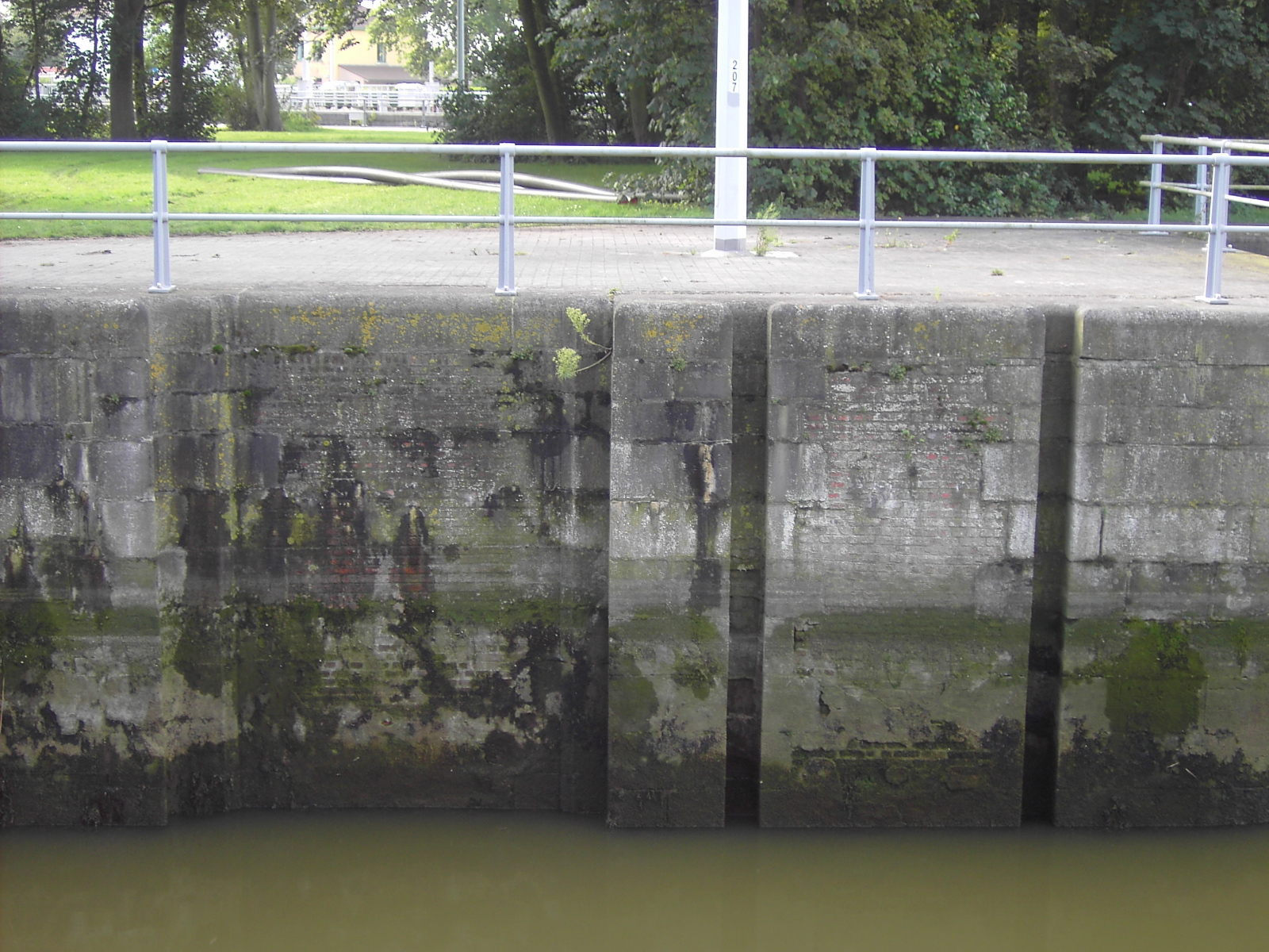 Muurkast voor vloeddeuren en gleuven voor schotbalken.